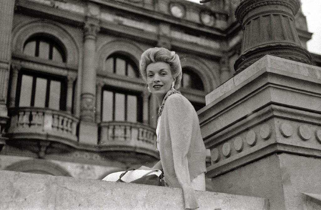 Título original: La actriz Conchita Montenegro en San Sebastián (2/7) Localización: San Sebastián (Guipúzcoa)